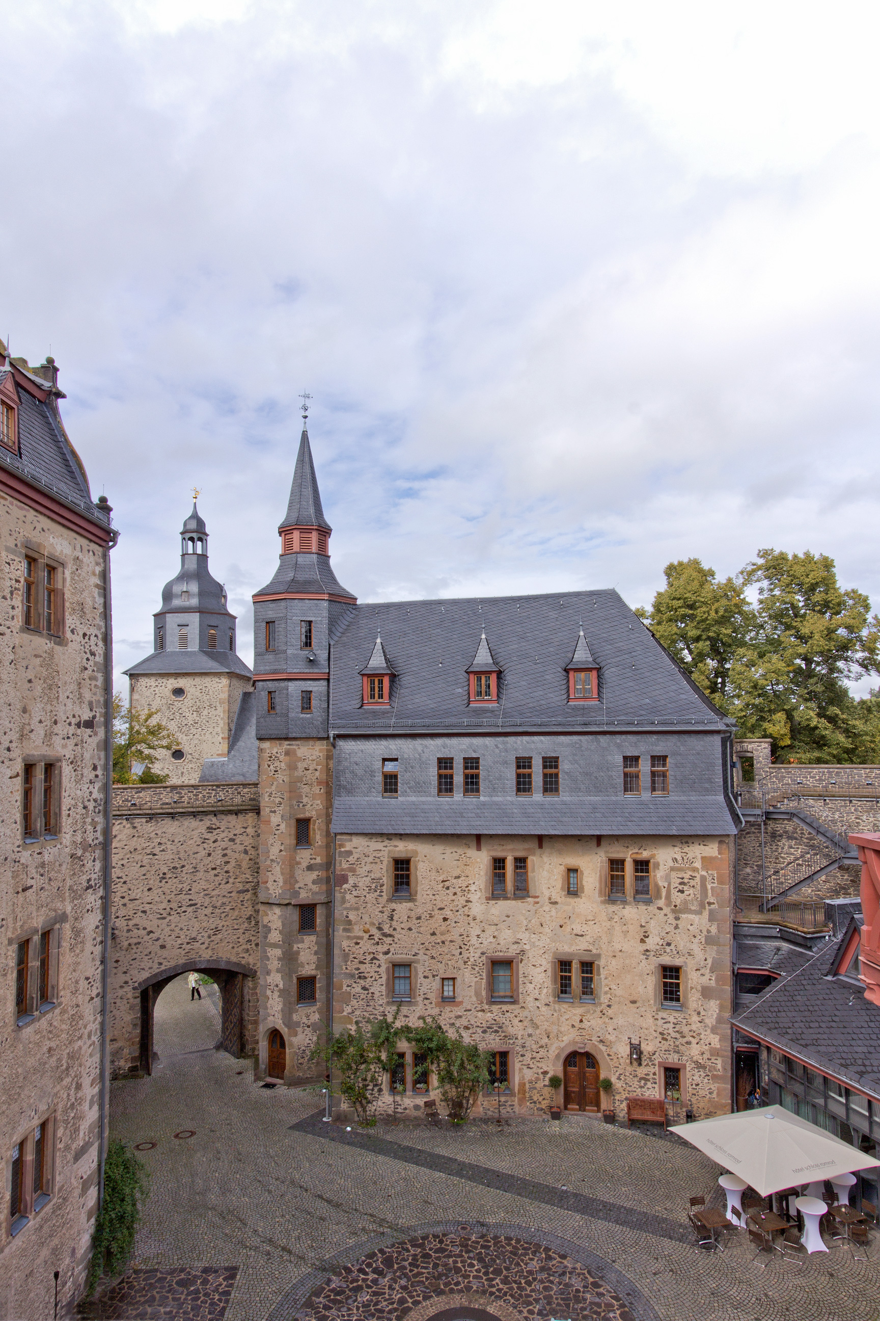 Schloss Romrod in Romrod im Vogelsberg|.